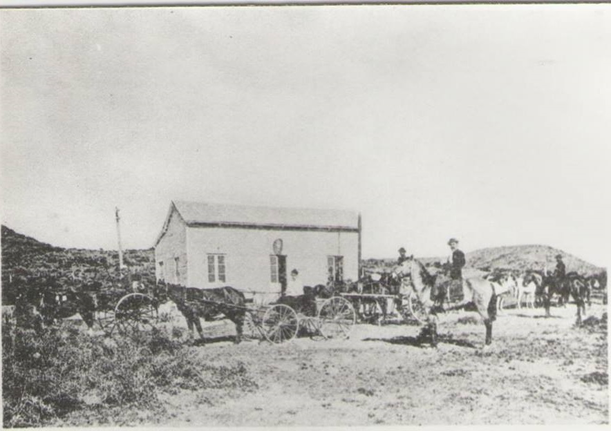 Estafeta postal de Dos Pozos, Chubut